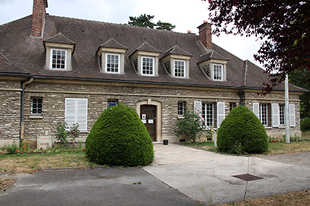 Domaine historique de Montfermeil